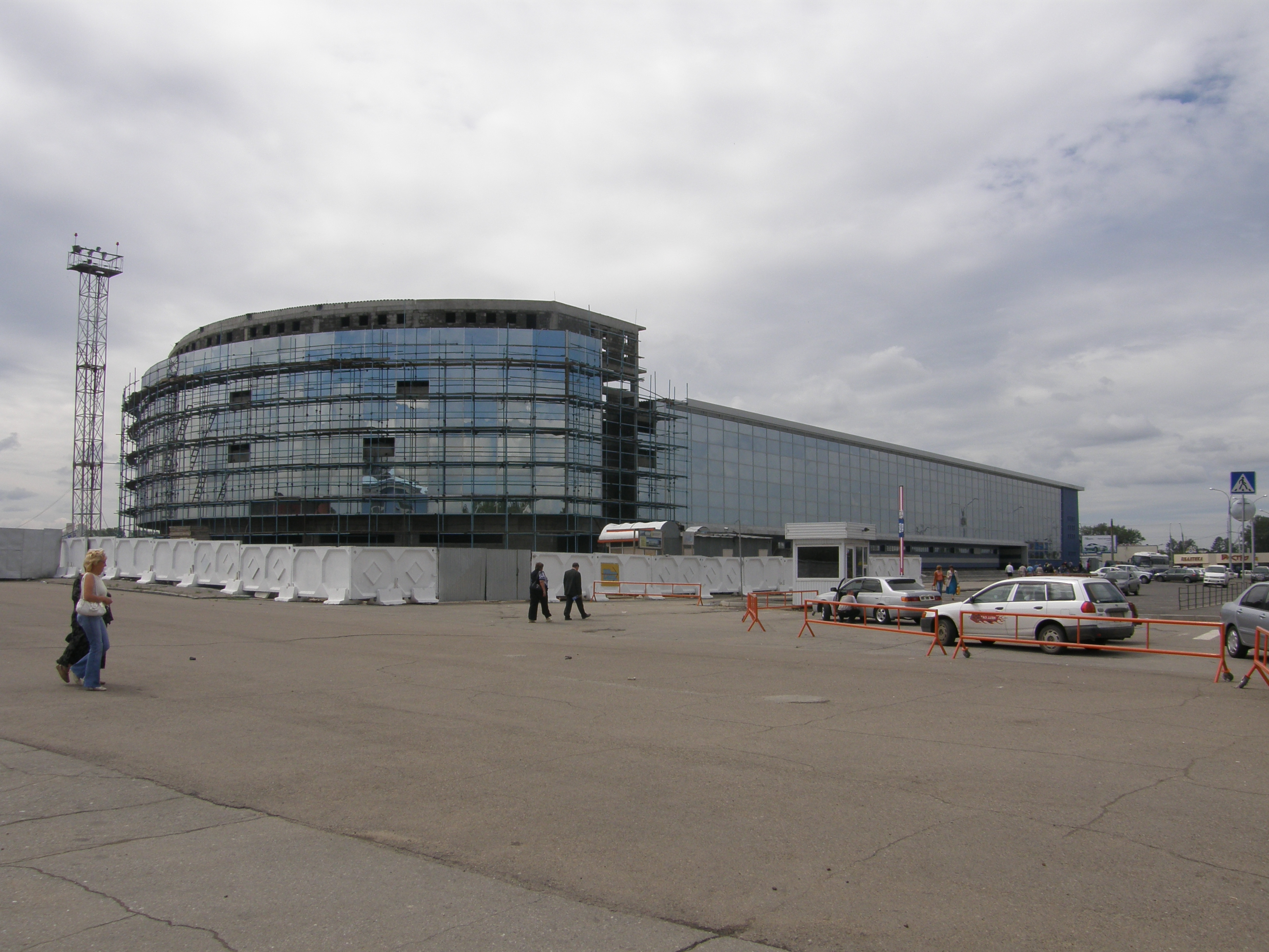 Здание иркутского аэровокзала на реконструкции (лето 2007 года). Domestic terminal under reconstruction